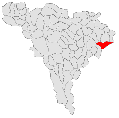 Categorie:Hărţi ale judeţului Alba